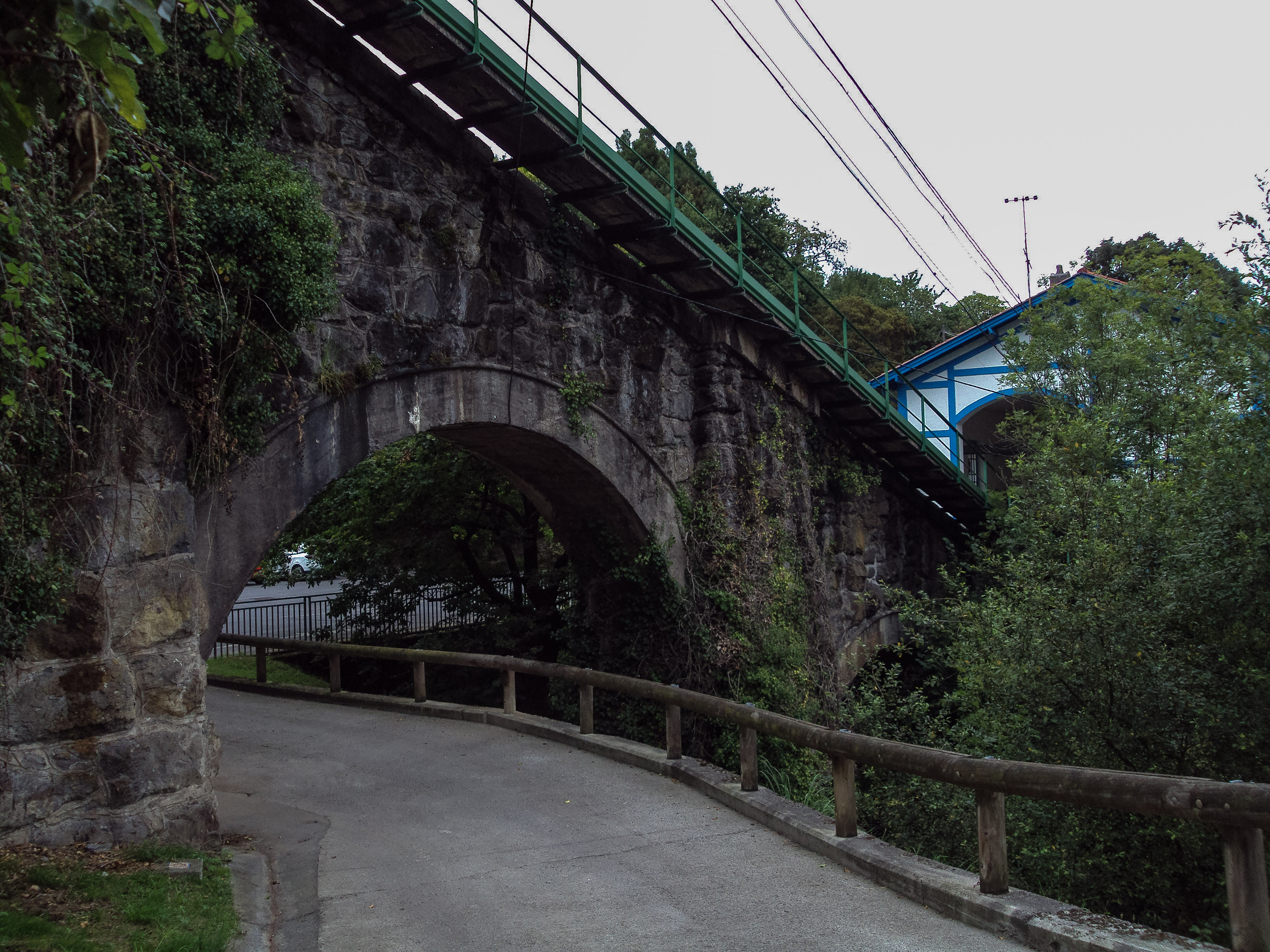 Abiaburuko biaduktua